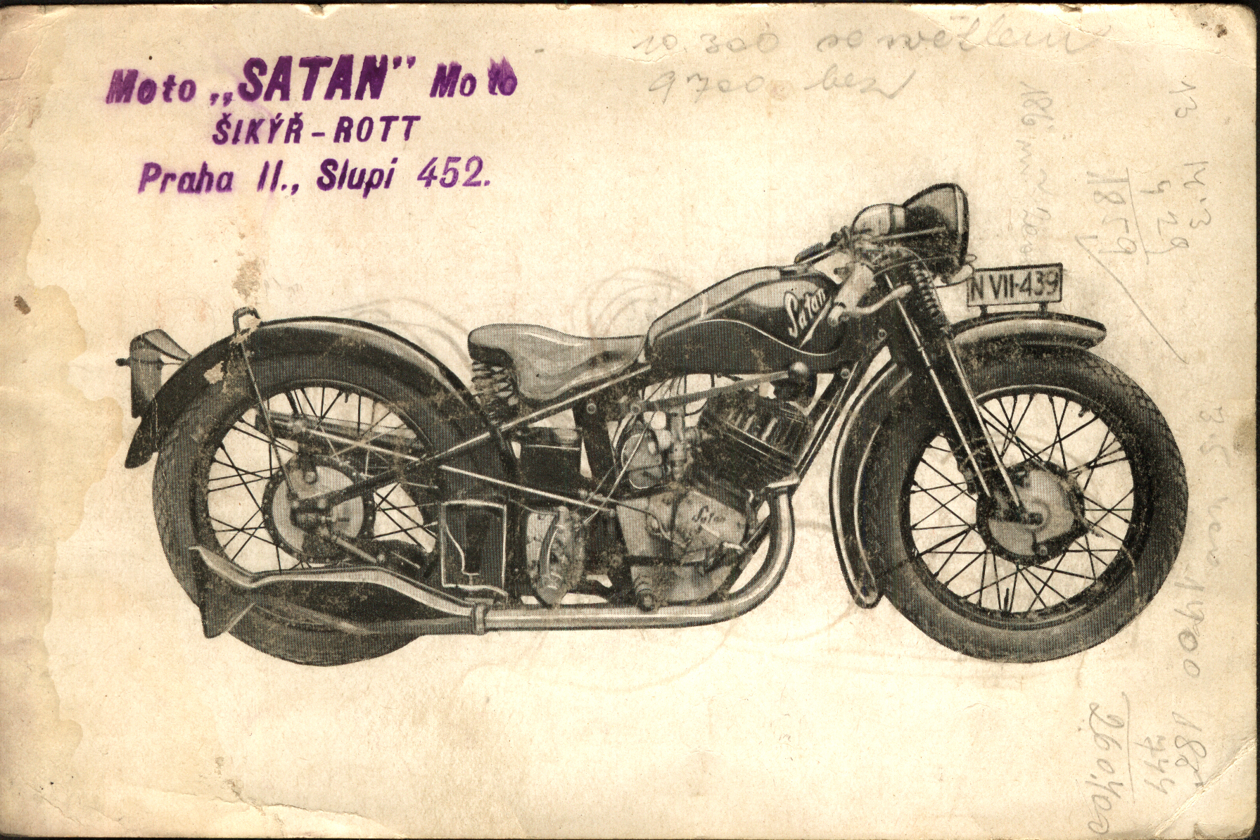 Reklamní leták na motocykl "SATAN" z roku 1929, autor neznámý.